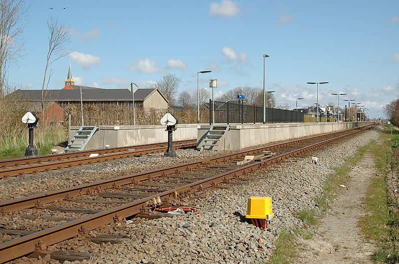 Station Usquert